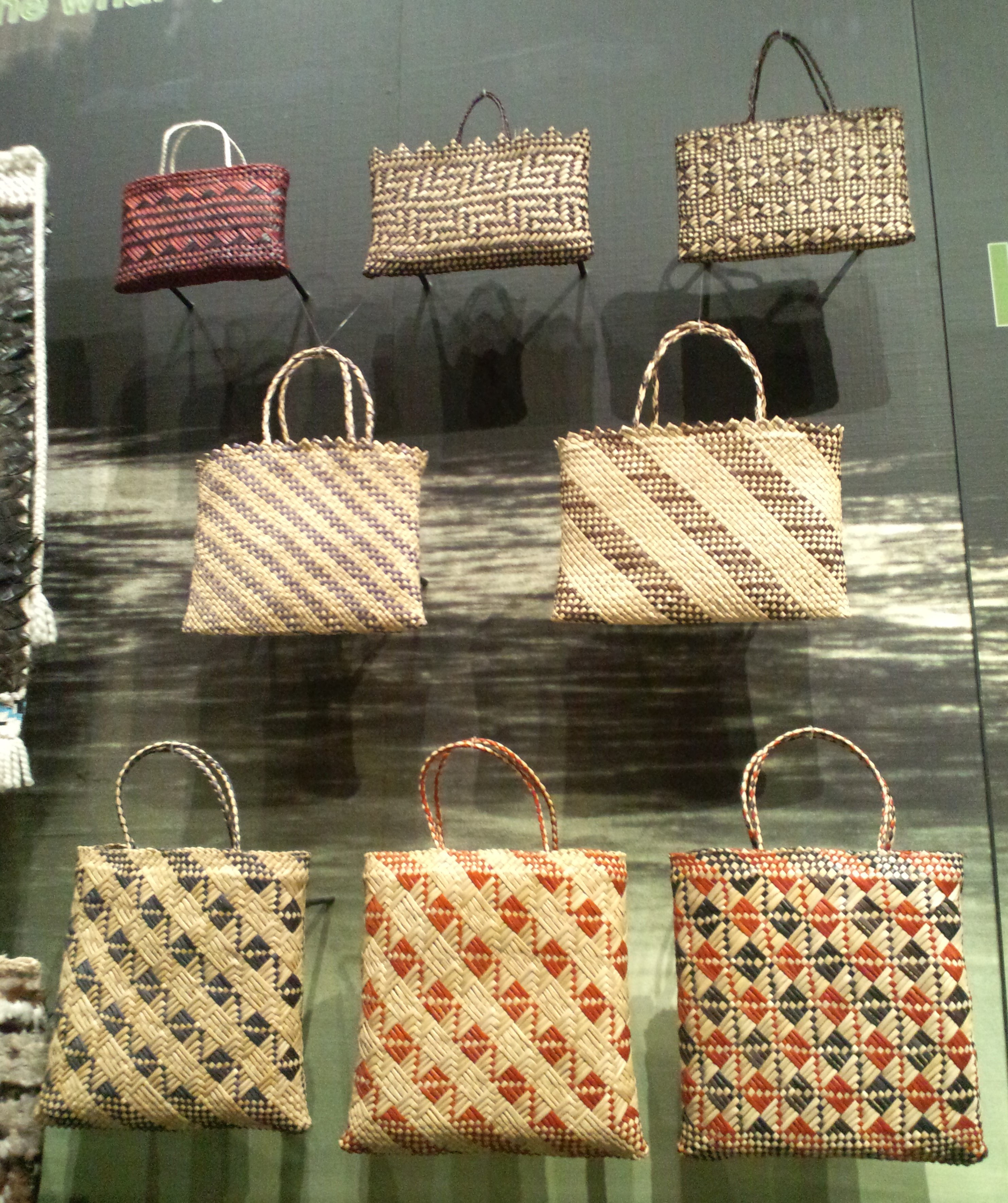 国立民族学博物館（大阪） 手提げカゴ「ケテ・ファカイロ」（ニュージーランド、マオリ族、1990年代製作）